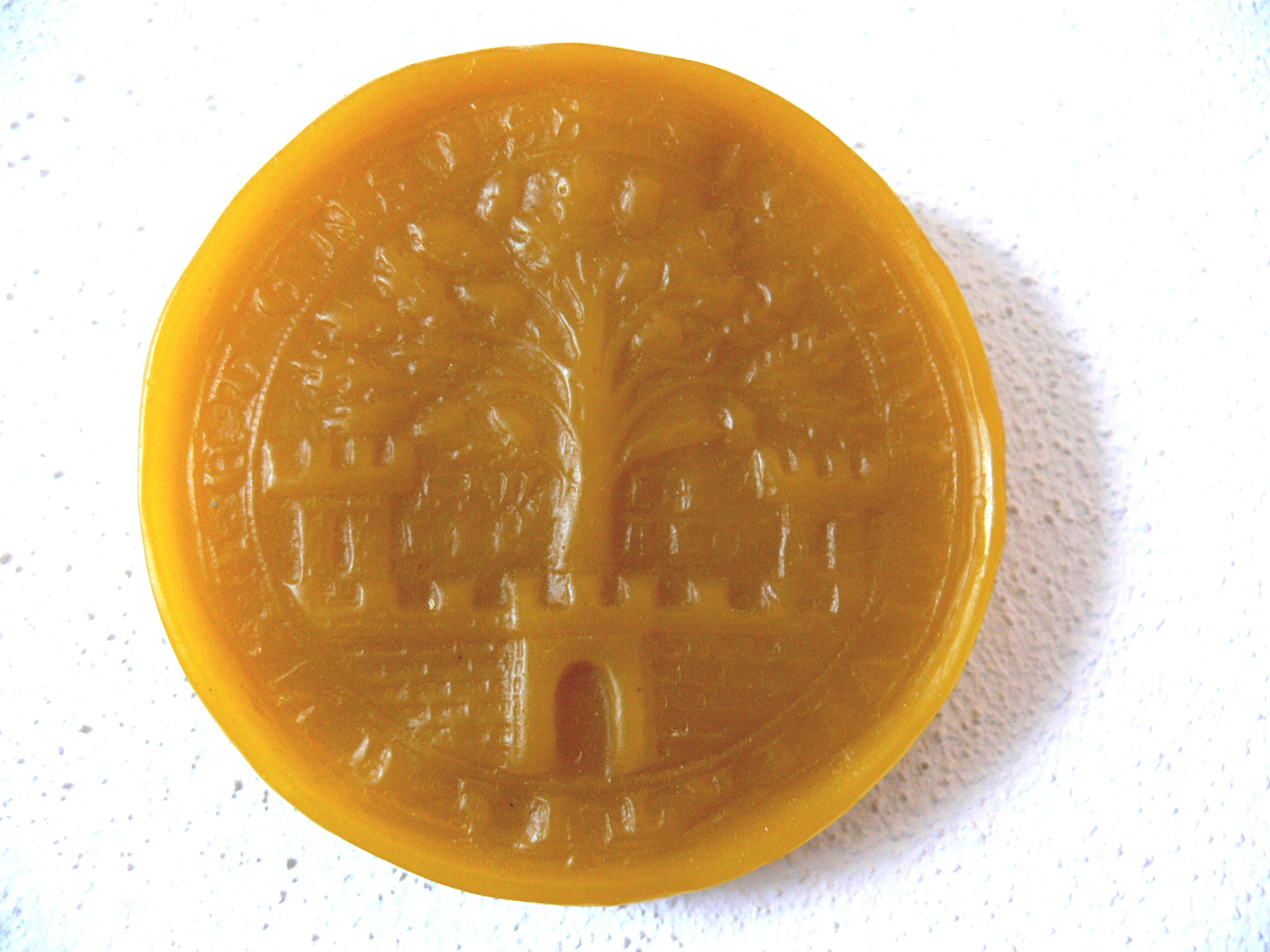 Stadtsiegel von Eichstätt 1263.Umschrift:"Sigillum Civitatis Eystetensis". Das Bild zeigt eine Eiche in Stadtmauern.